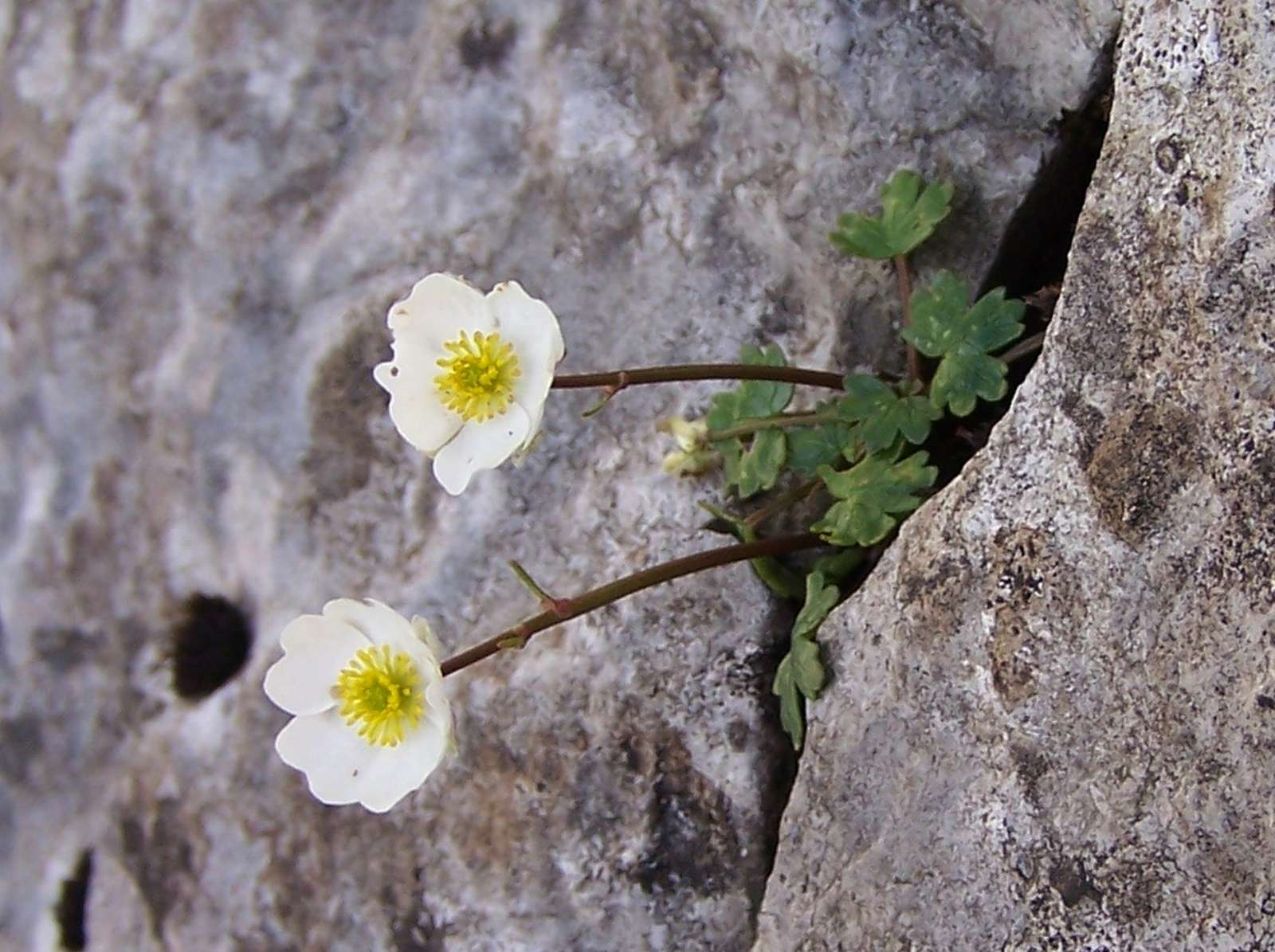 Ranunculus alpestris (pl. jaskier alpejski), habitat: Tatra Mountains, Ciemniak